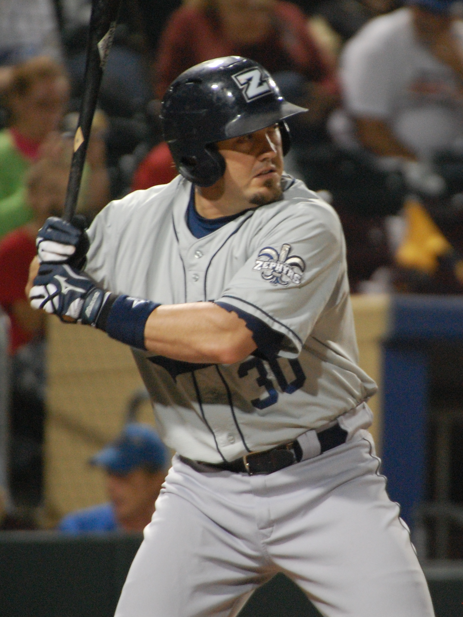 Luke Montz